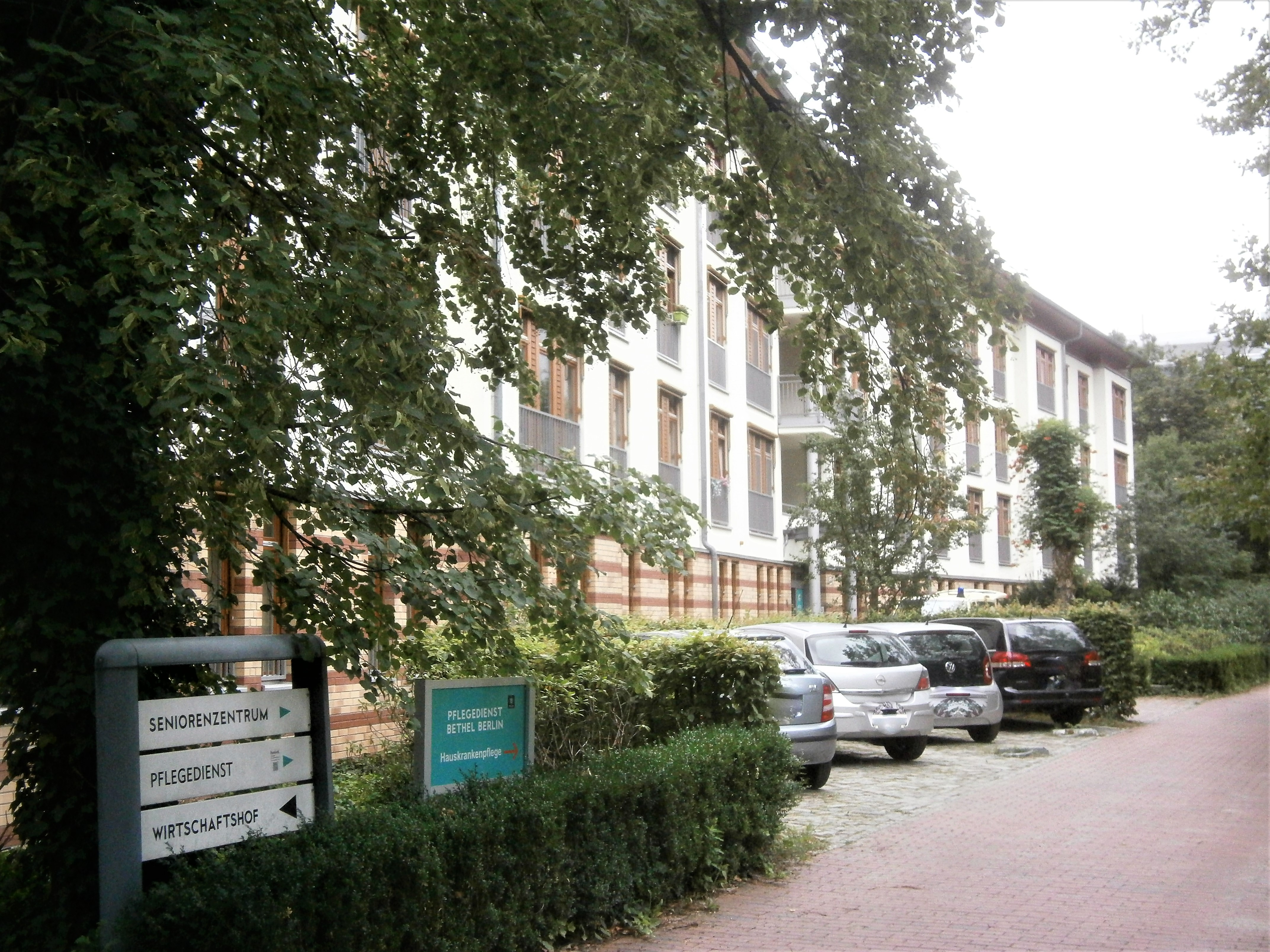 Die Andreasstraße ist eine Straße im Berliner Bezirk Friedrichshain-Kreuzberg, Ortsteil Friedrichshain. Angelegt wurde sie 1862 auf vorherigen Gartenland und 1863 benannt. Bis um 1900 waren die Grundstücke bebaut und bis 1930 wurde verdichtet. Bei Luftangriffen im Zweiten Weltkrieg wurde die Gebäude schwer getroffen. So ist die Straße seit den 1950er Jahren mit wiederhergestellten Altbauten, aber besondres durch Plattenbau-Wohnblöcke aber seit 1990 auch durch Hotel- und Bürobauten im Umfeld des Ostbahnhofs charakterieisiert. Das Bild zeigt: Seniorenzentrum Bethel Berlin, Andreasstraße 21, um 1960 errichtet.